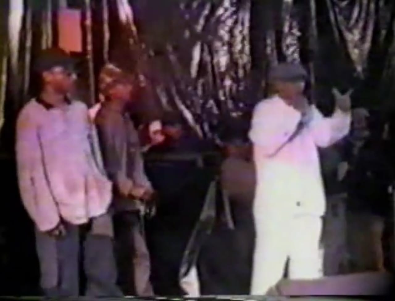 La Etnia, concierto Medellín, Colombia (1995)